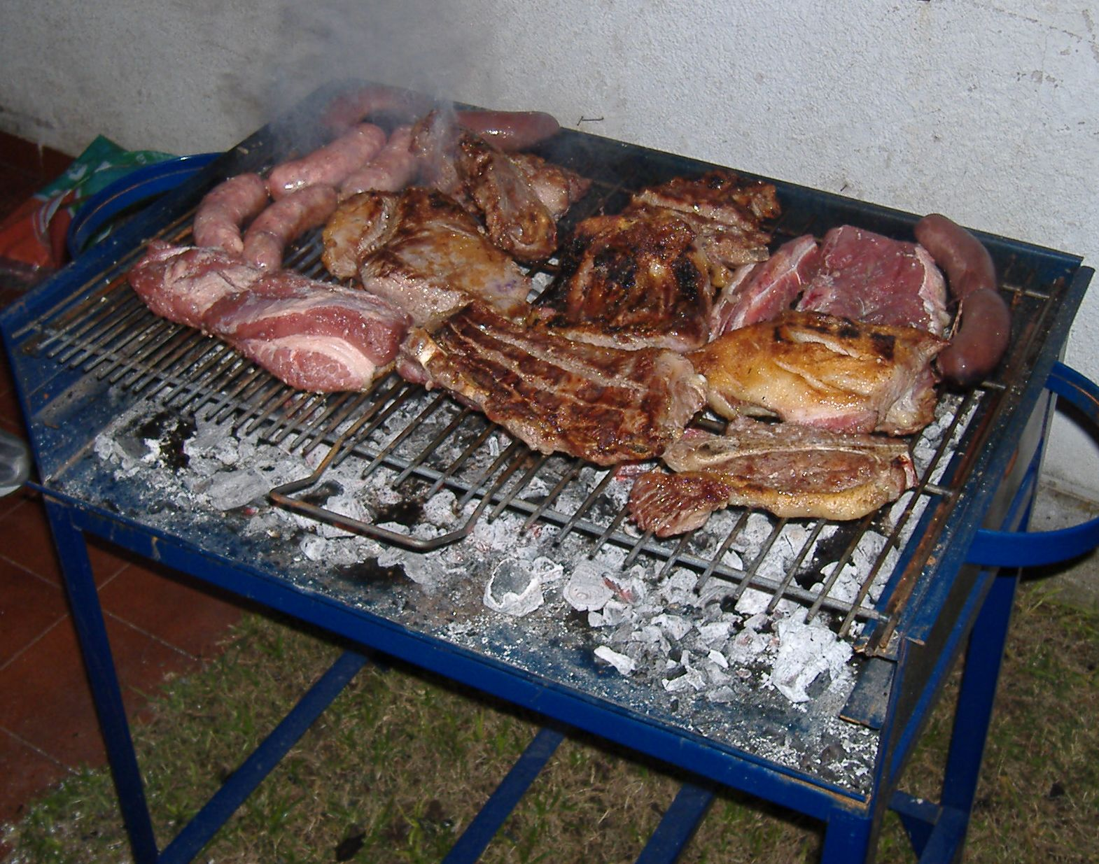 Asado (a barbecue), Argentine style.